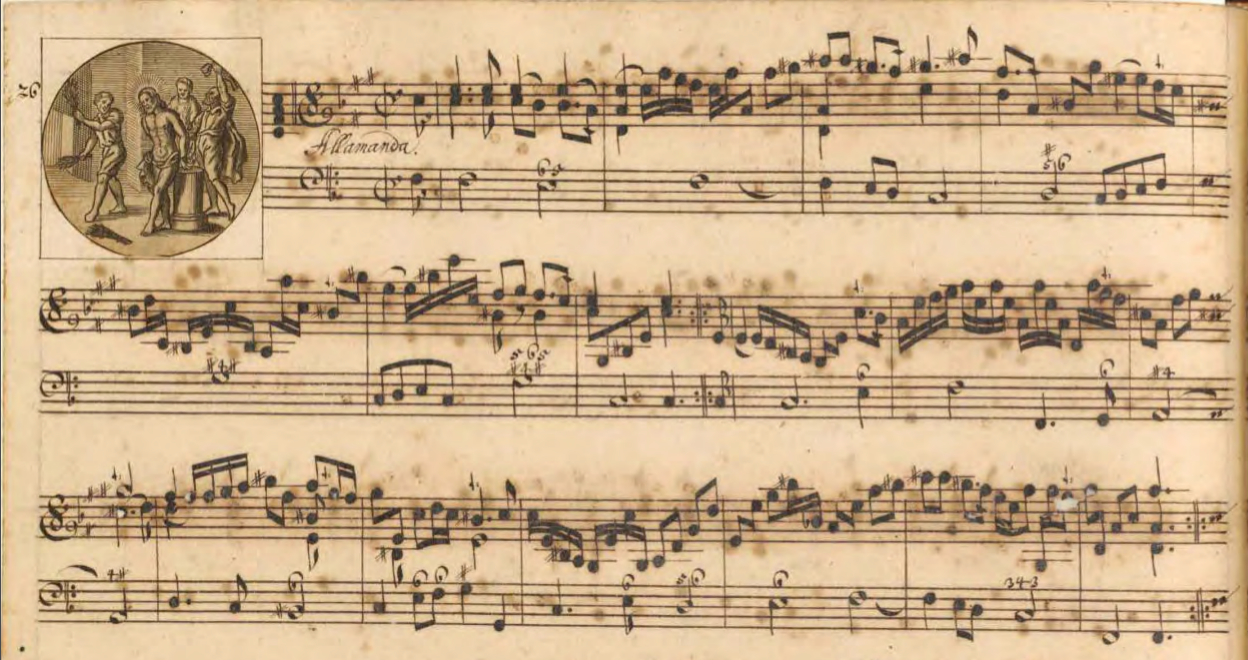 Incipit du manuscrit la Sonate du Rosaire n° 7 de Biber.